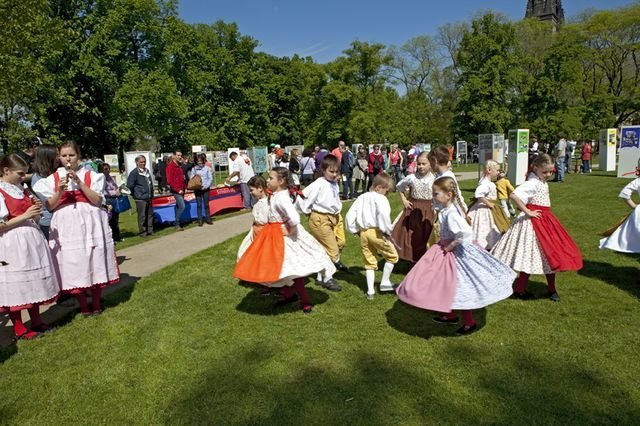 Zahájení výstavy Má vlast cestami proměn na Vyšehradě.